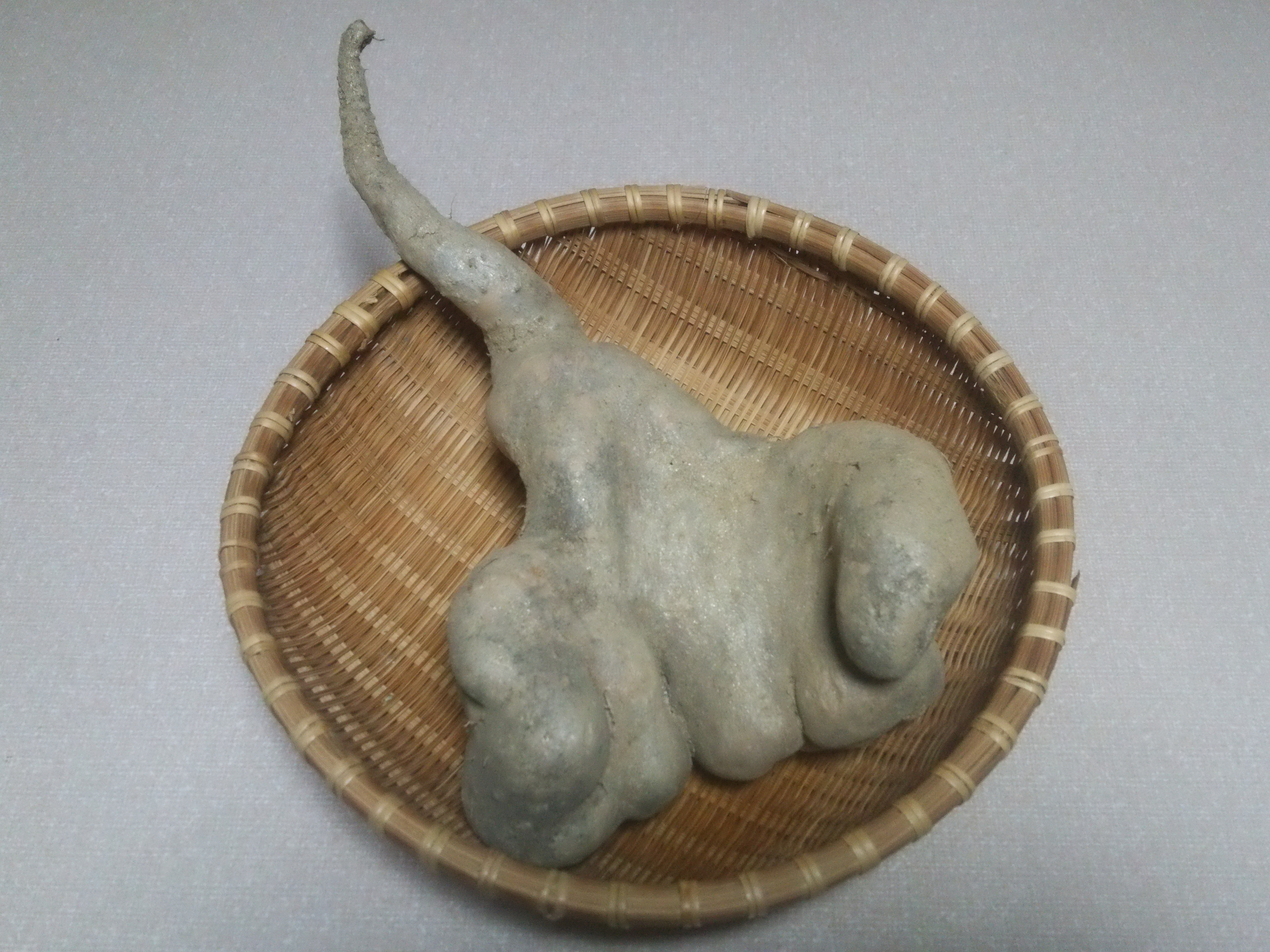 吉野産のいも